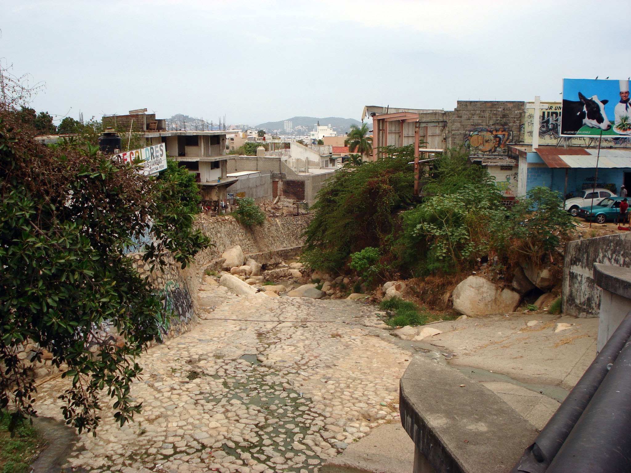 Cauce del río del Camarón visto desde el puente que lo cruza en la Avenida Constituyentes, ubicada en la parte alta de la ciudad y puerto de Acapulco, Guerrero, México. En este sitio se ubicaba la iglesia de la Sagrada Familia que fue socavada y destruida por completo por la creciente de este río durante el paso del Huracán Paulina el 9 de octubre de 1997.